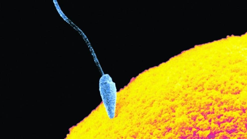 Espermatozou s'uneix a l'òvul